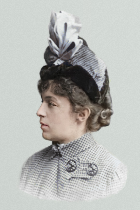 Russian Painter Elena Samokysh-Sudkovskaya (1863-1924)